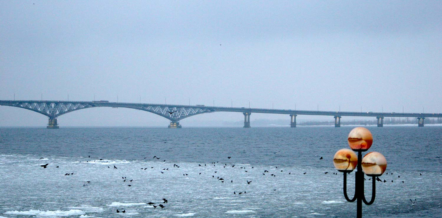 Саратовский автомобильный мост